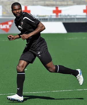 Samuel Wowoah